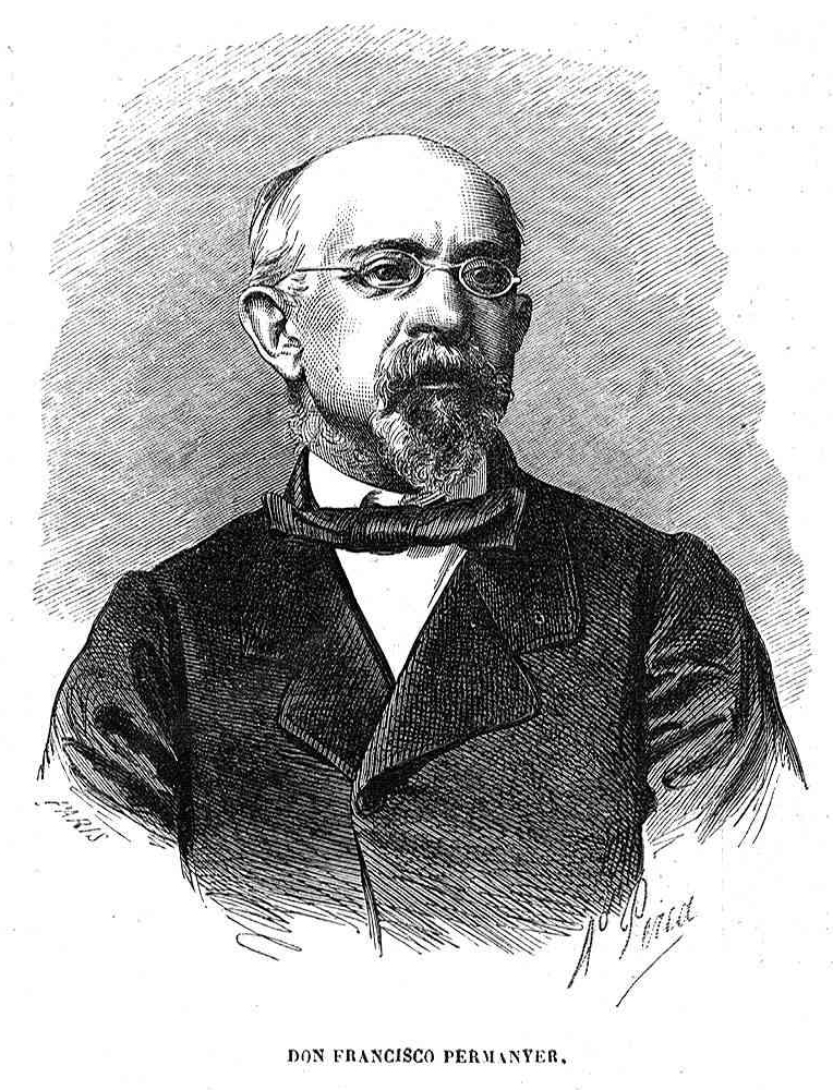 Francisco Permanyer en la revista española El Museo Universal.